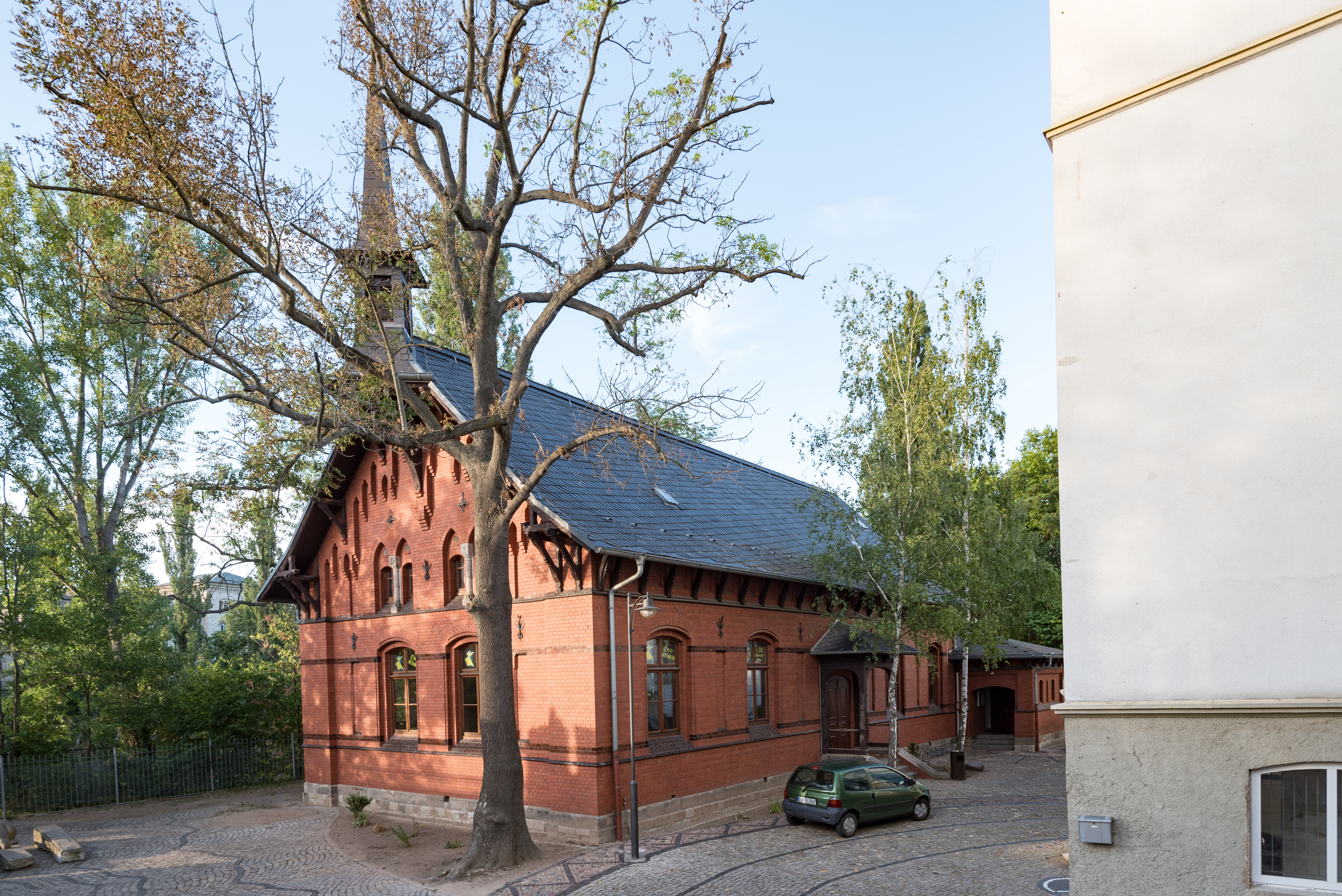 Weißenfels, Promenade 35, 37, 39, Turnhalle